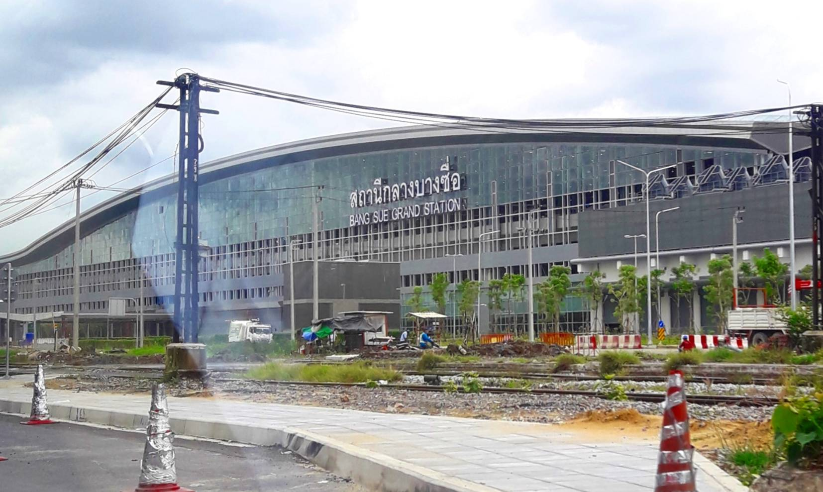 สถานีกลางบางซื่อมุมมองจากถนนเทอดดำริในเดือนมิถุนายน พ.ศ. 2563